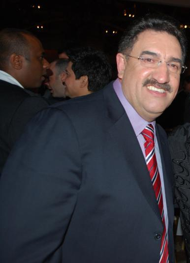 Ratinho no CH & X 40 Anos.